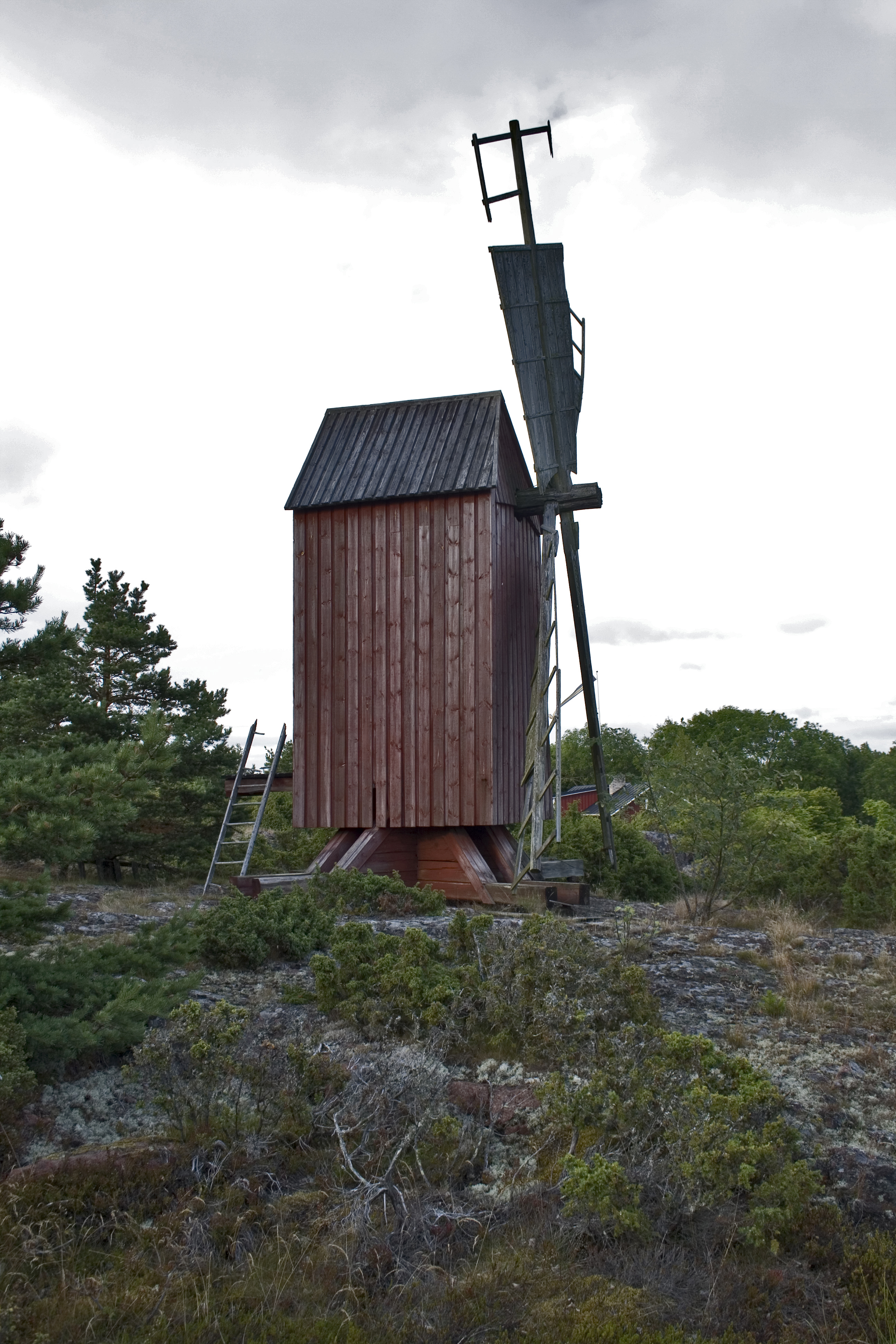 Toimimaton tuulimylly Holmsklinttenillä Vårdöllä, Ahvenanmaalla